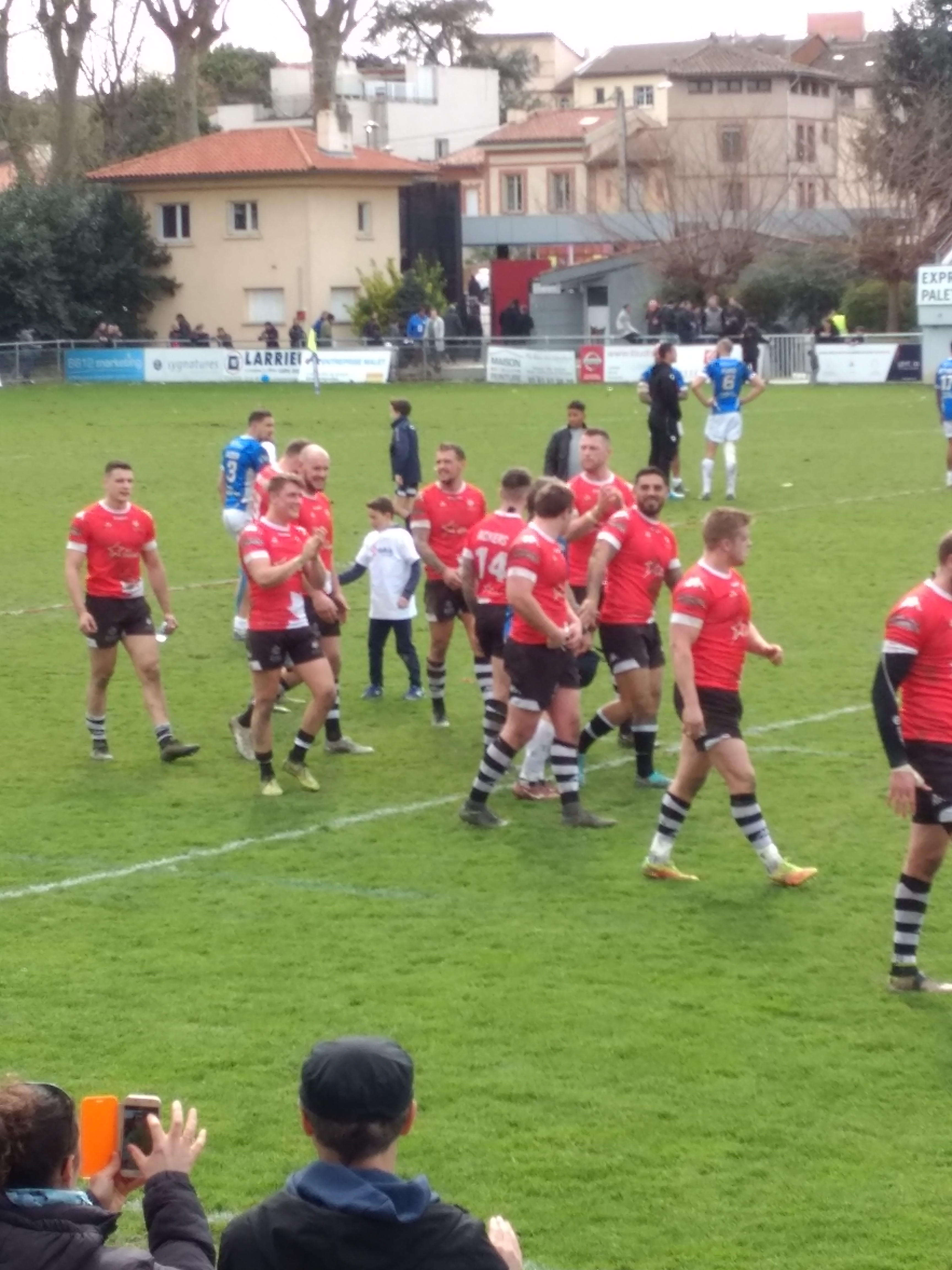 Photo personnelle prise après le match